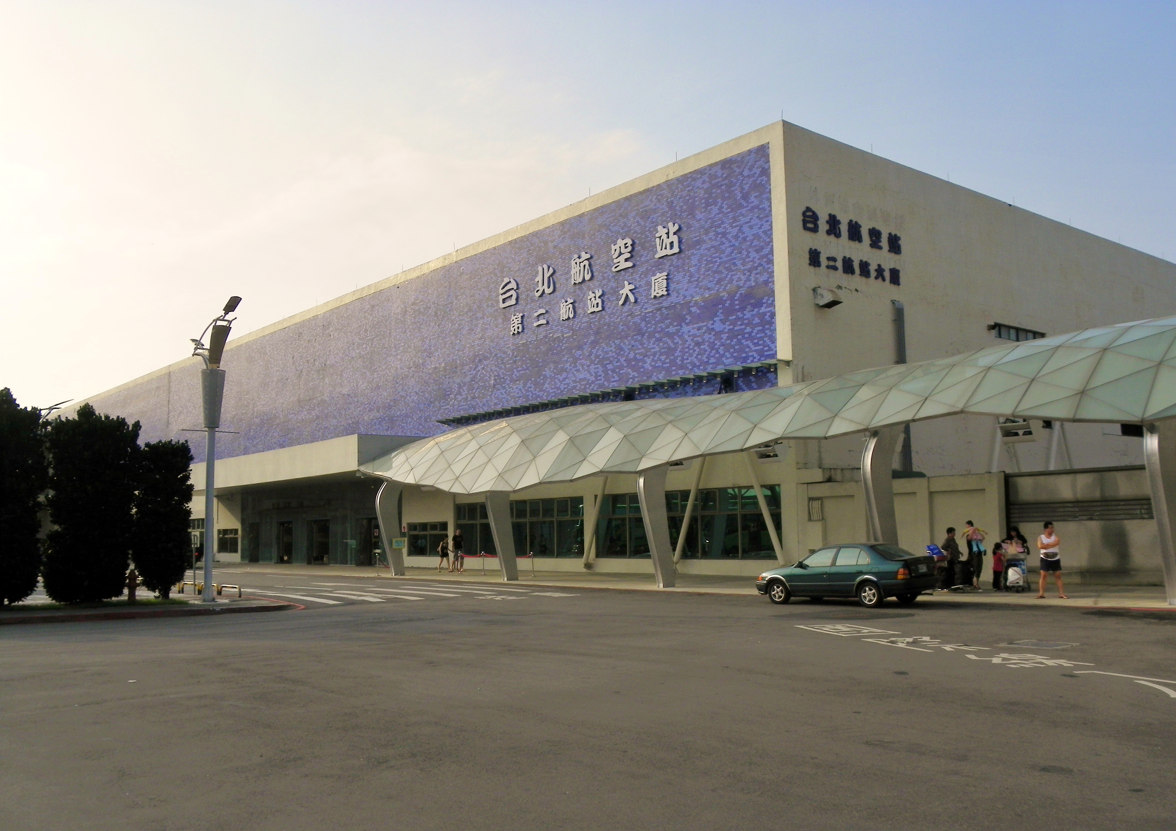 台北松山空港第2ターミナルビル。 Bân-lâm-gú: Tâi-pak Siông-san Ki-tiûnn tē-2 hâng-khong tāi-hā.